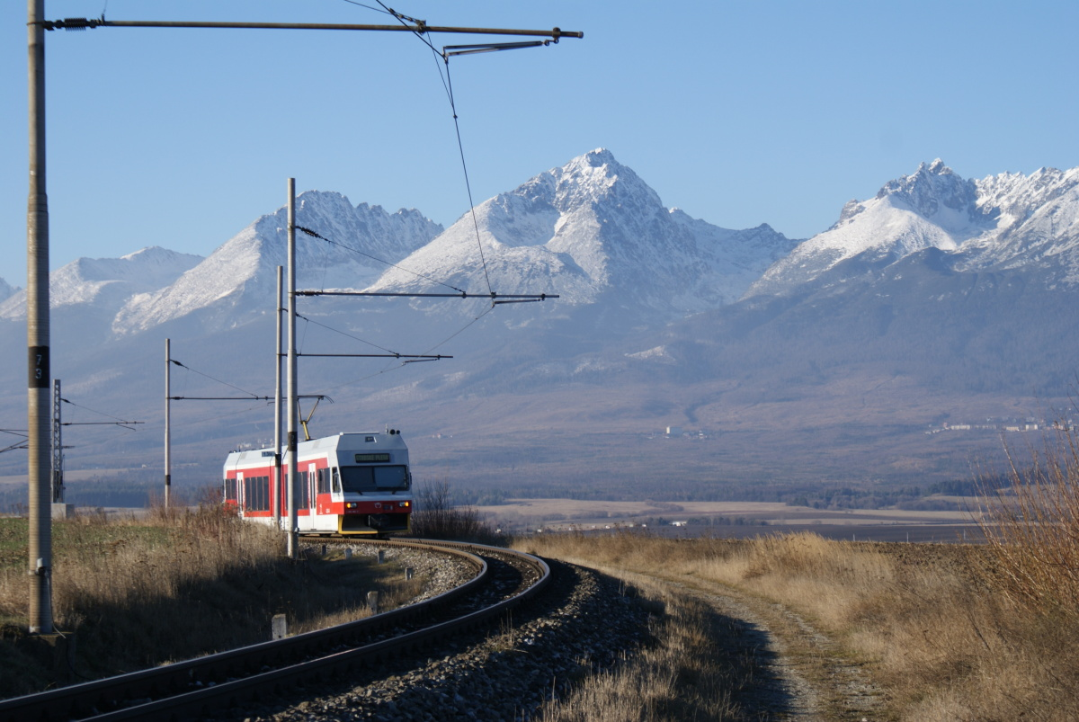 Trať Tatranskej elektrickej železnice